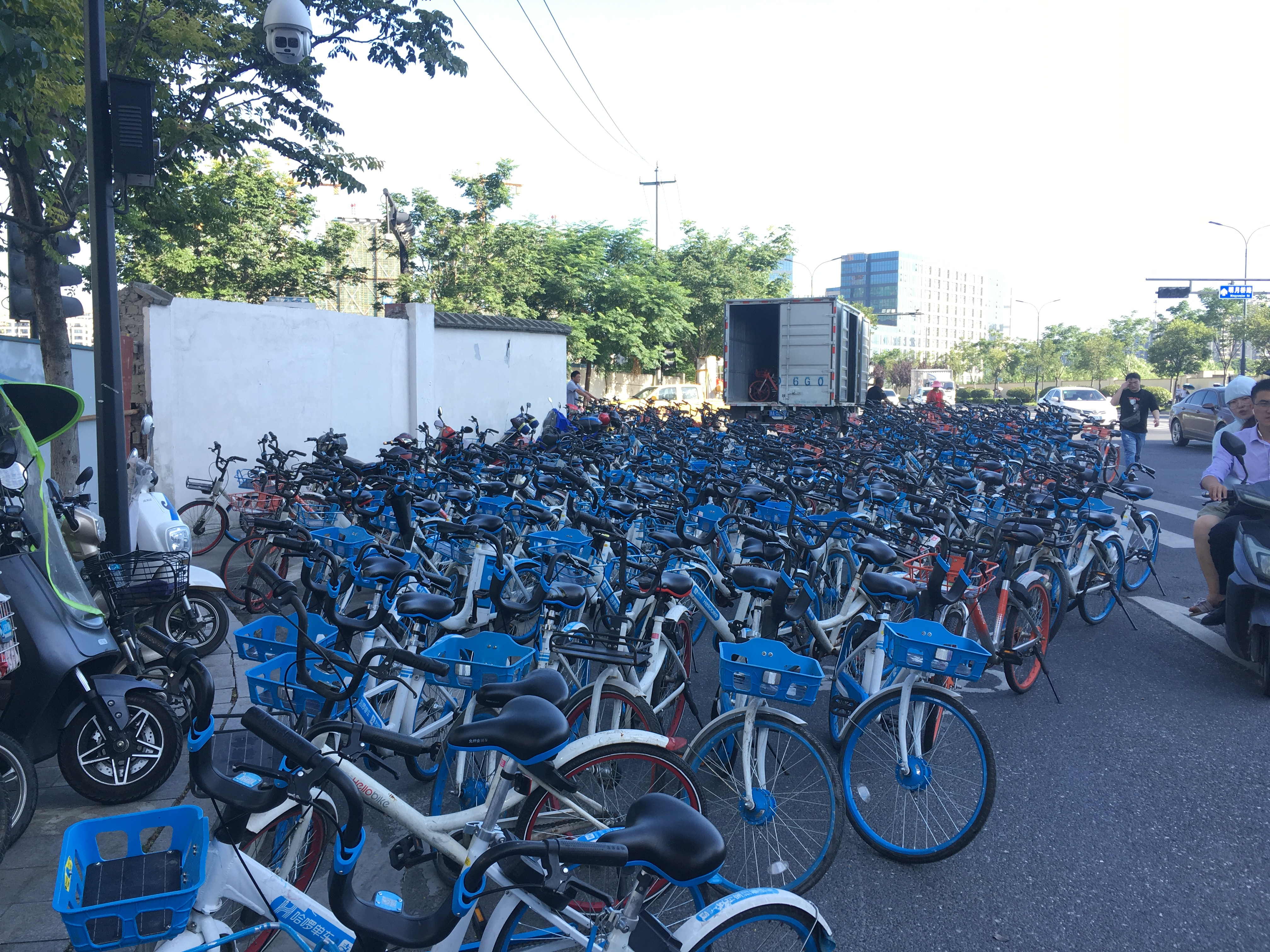 堆积成海的Hellobike